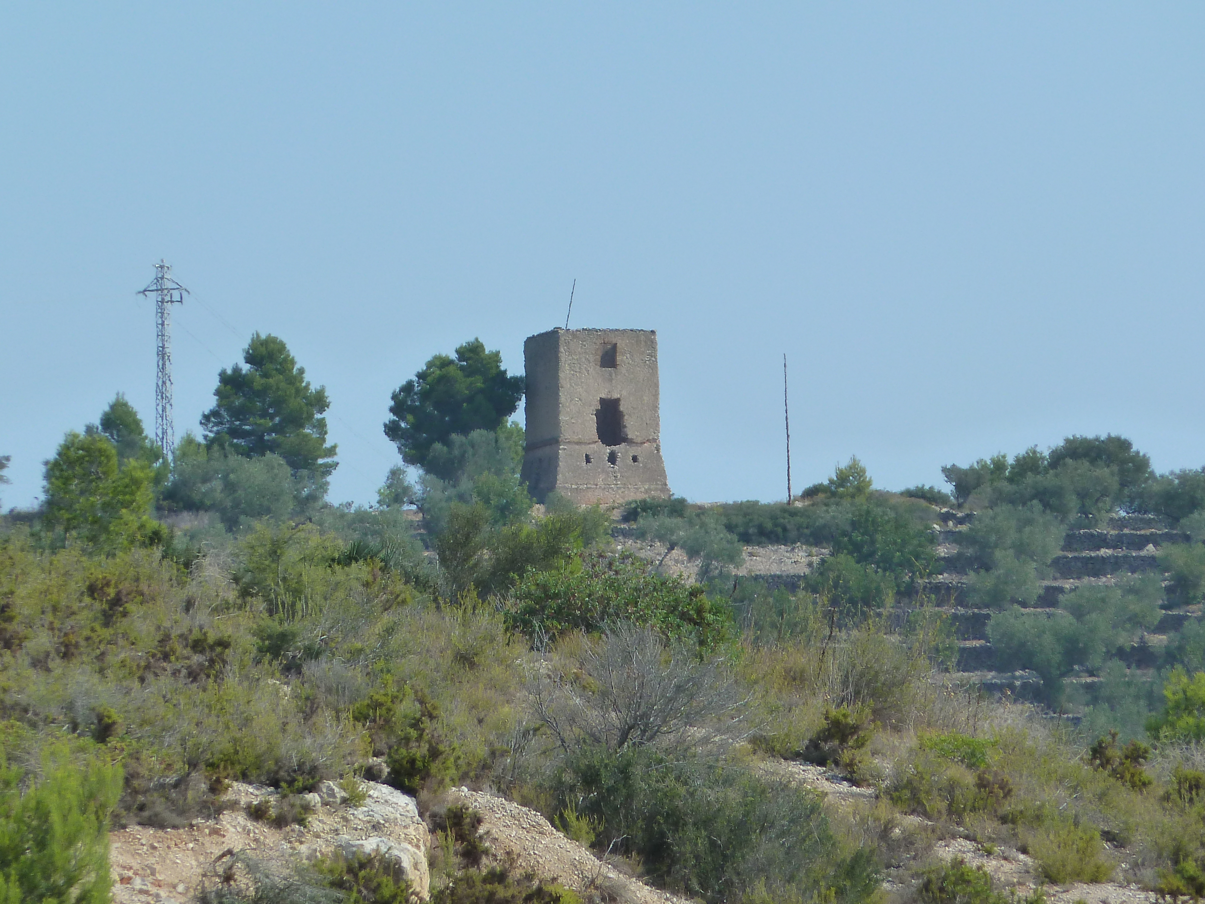 Torre de les Guàrdies